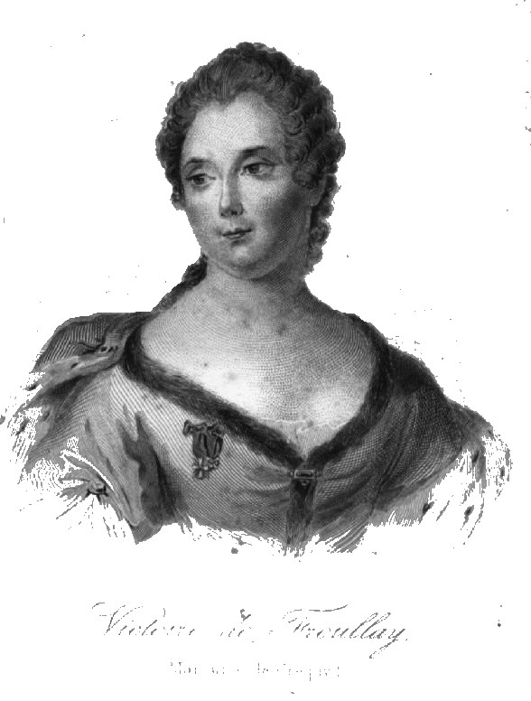 Portrait de la Marquise de Créquy (extrait du premier volume de ses Mémoires)